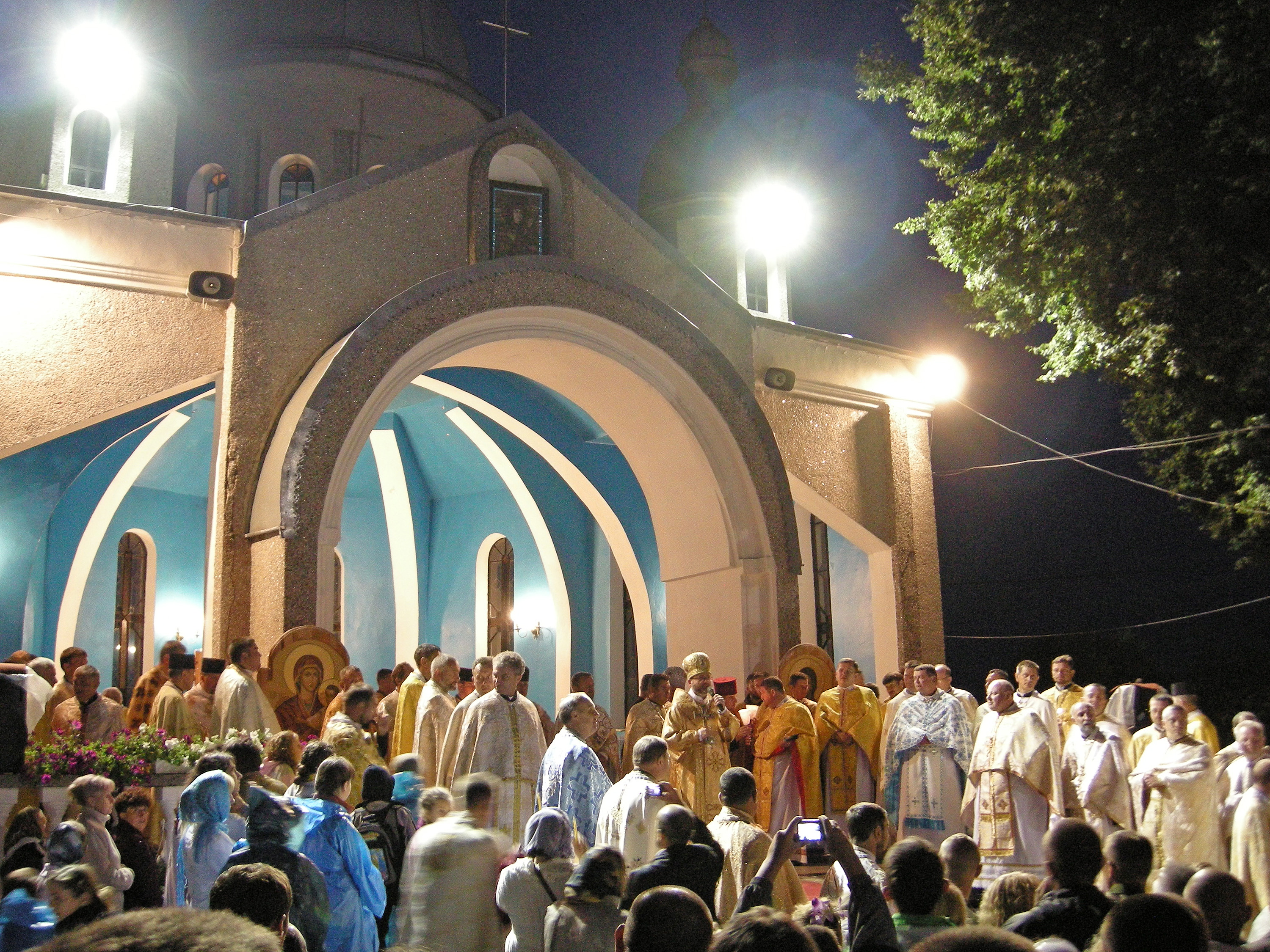 Всеукраїнська проща до Зарваниці 2013 року. Літургія біля парафіяльної церква Пресвятої Трійці.